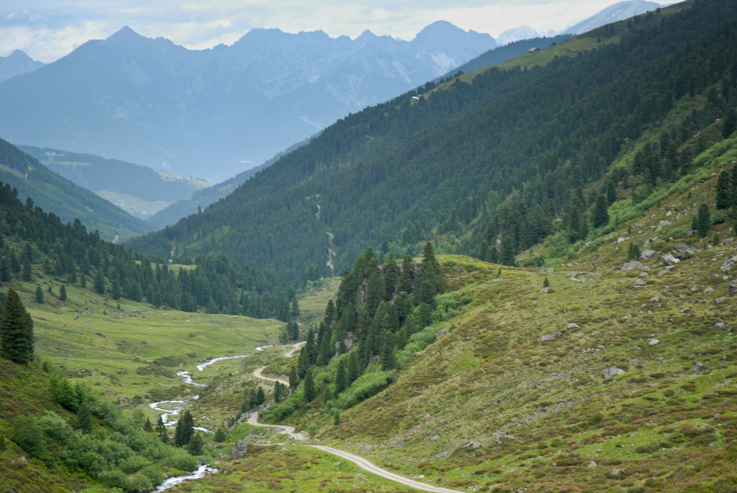 Der Rieglschrofen (Ullafelsen) im Fotscher Tal, ein mittelsteinzeitlicher Fundplatz. Im Hintergrund die Erlspitzgruppe im Karwendel mit der Reither Spitze rechts, den Freiungen, Kuhlochspitze und Erlspitze (von links nach rechts)